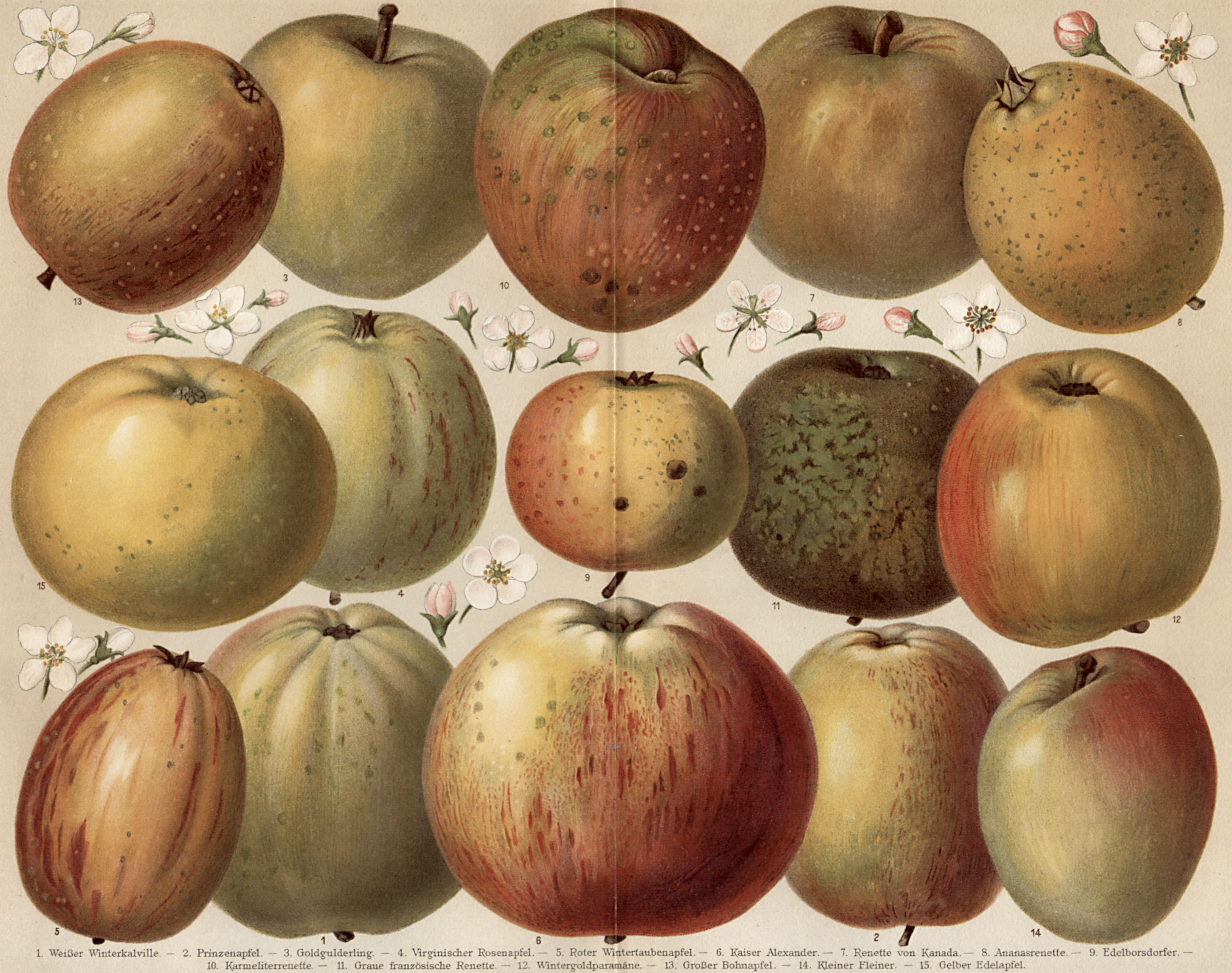 Apfelsorten nach dem pomologischen System Diel-Lucas. Von links nach rechts, von oben nach unten: 13: Großer Bohnapfel, 3: Goldgulderling, 10: Karmeliterrenette, 7: Renette von Kanada, 8: Ananasrenette, 15: Gelber Edelapfel, 4: Virginischer Rosenapfel, 9: Edelborsdorfer, 11: Graue französische Renette, 12: Wintergoldparmäne, 5: Roter Wintertaubenapfel, 1: Weißer Winterkalville, 6: Kaiser Alexander, 2: Prinzenapfel, 14: Kleiner Fleiner